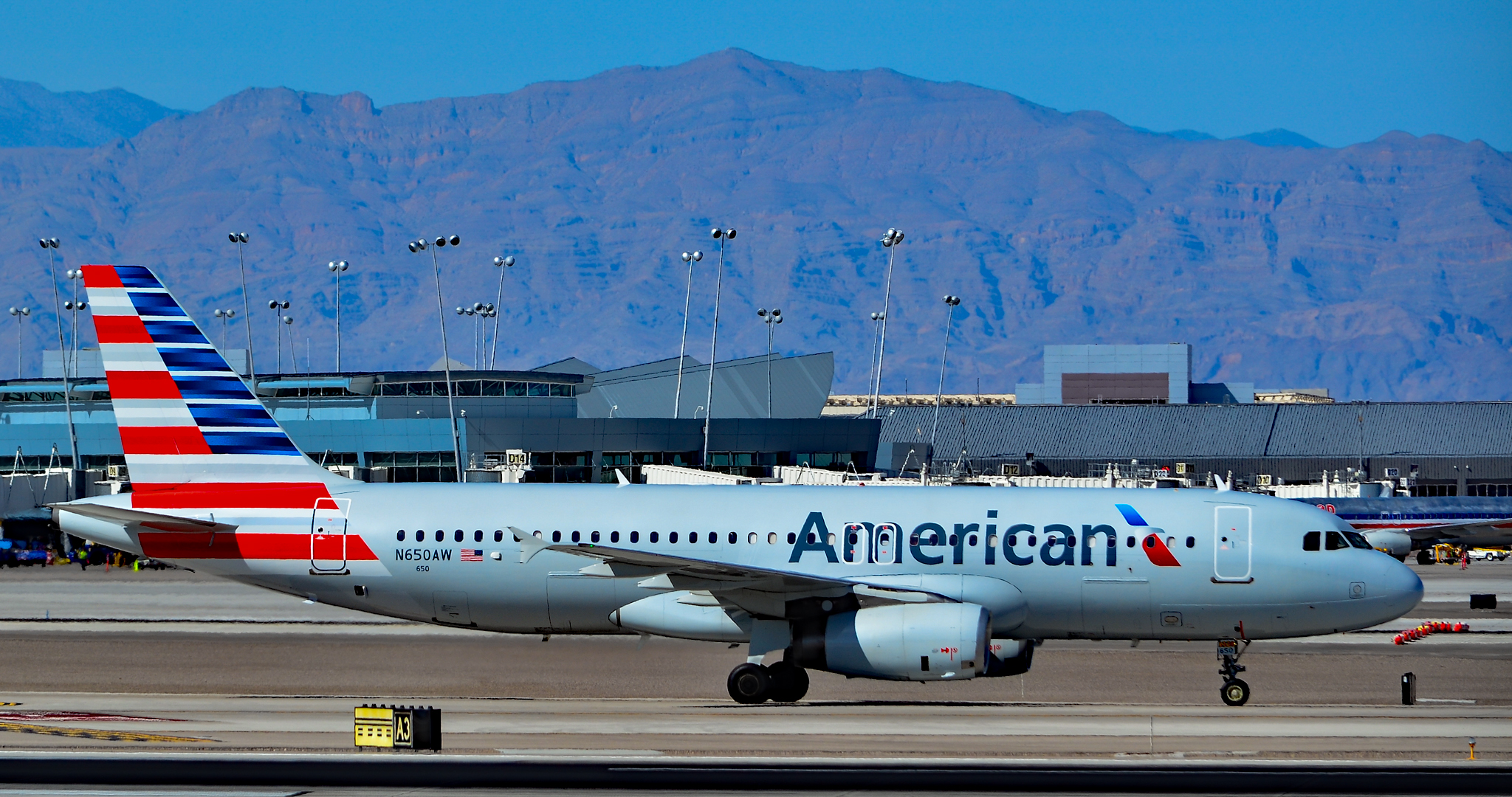 Las Vegas - McCarran International (LAS / KLAS) USA - Nevada, March 16, 2016 Photo: Tomás Del Coro